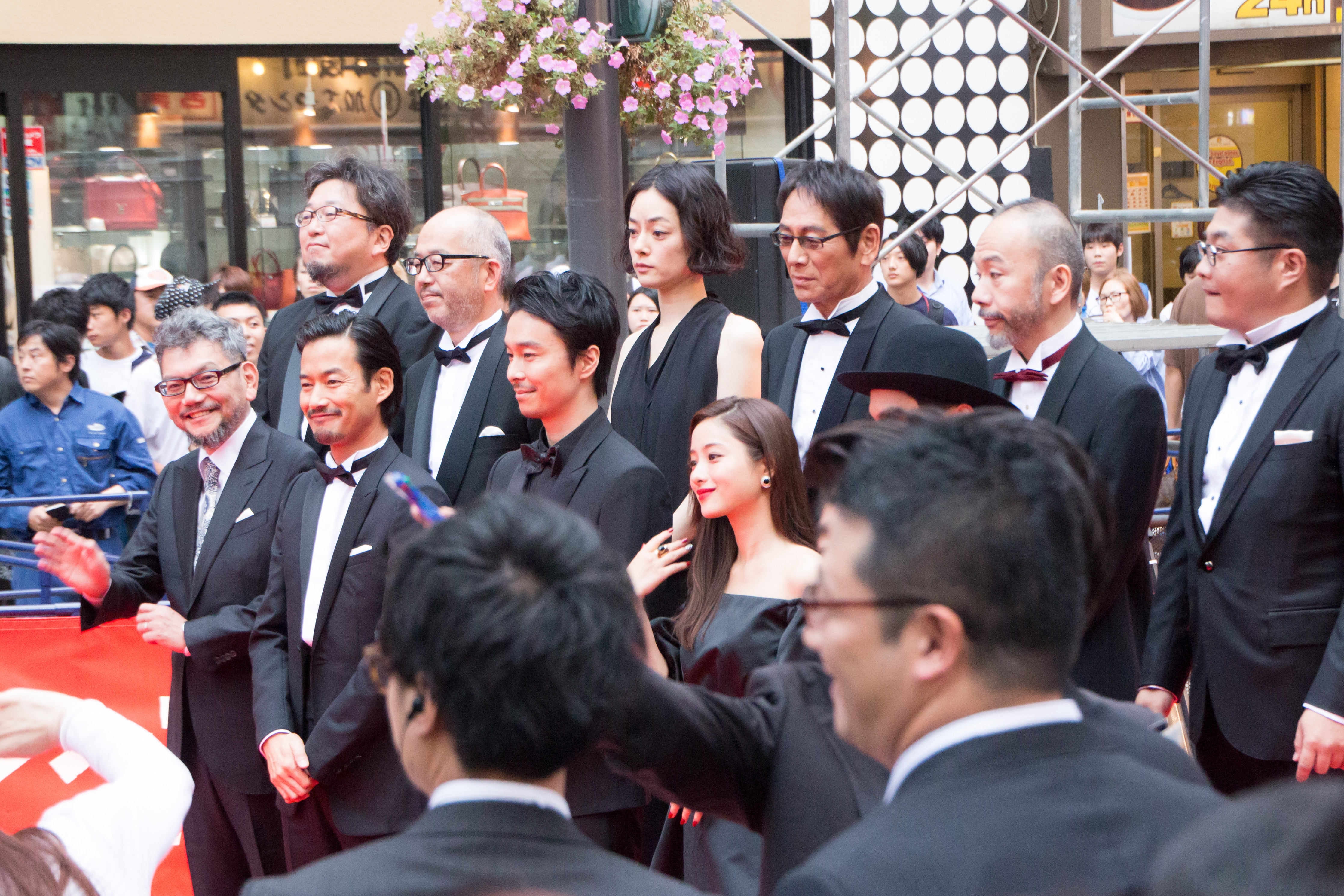 シン・ゴジラ ワールドプレミア レッドカーペットイベント 長谷川博己 竹野内豊 石原さとみ 高良健吾 松尾諭 市川実日子 大杉漣 塚本晋也 庵野秀明 樋口真嗣 尾上克郎